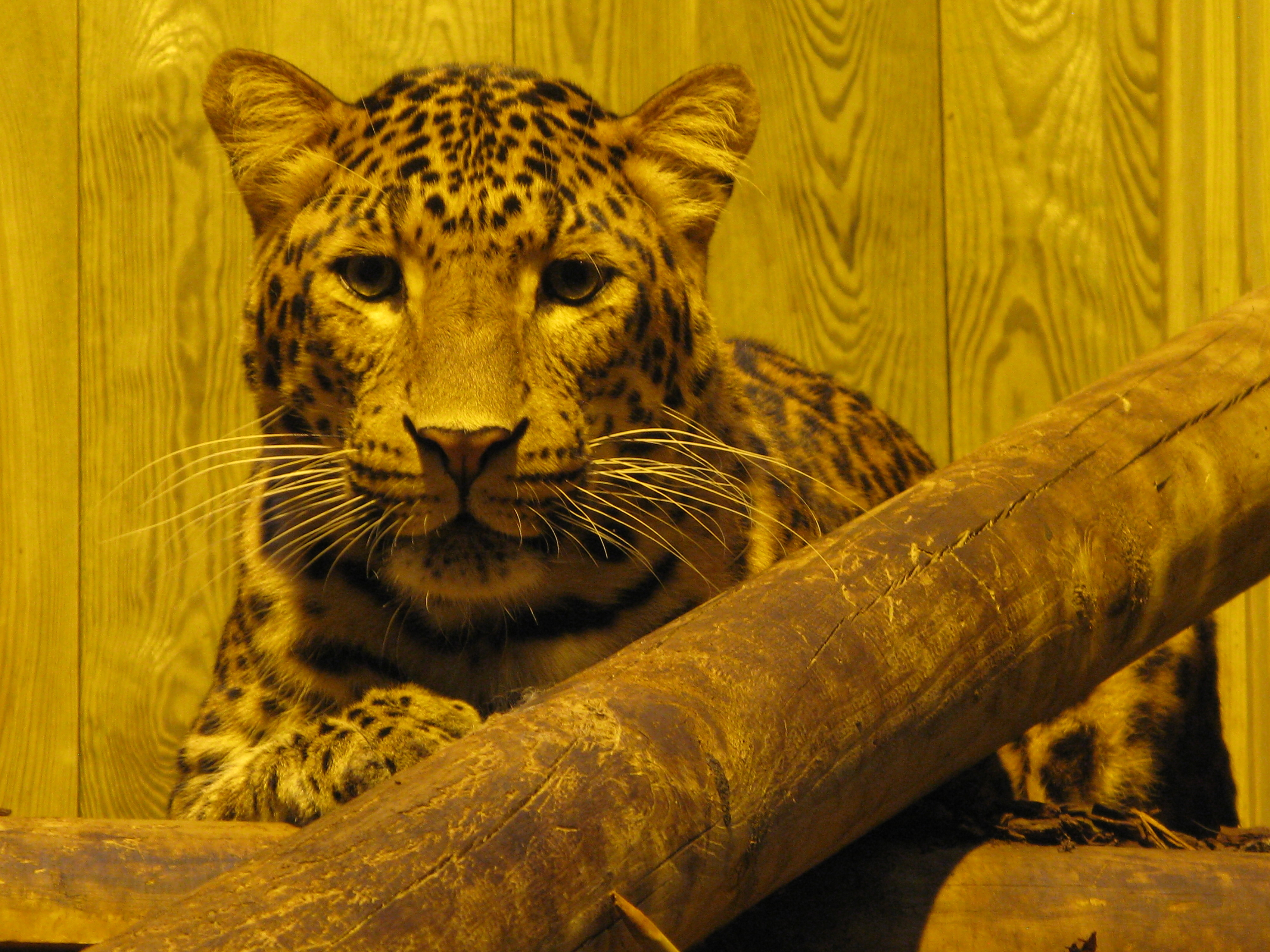 Panthère de Chine du Nord (panthera pardus japonensis), ménagerie du Jardin des Plantes de Paris.